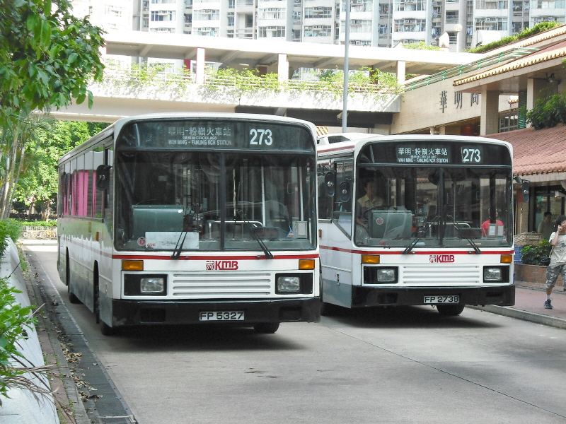 九巴273線的長矛巴士，攝於華明巴士總站